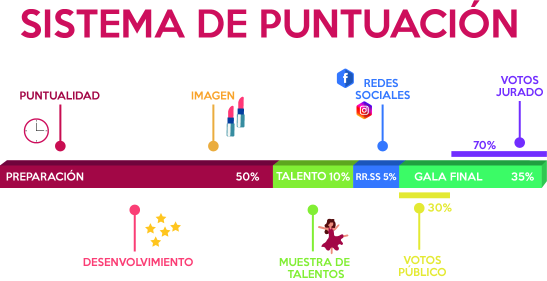 Gráfico que muestra el sistema de puntuación en los certámenes Regionales y Nacionales